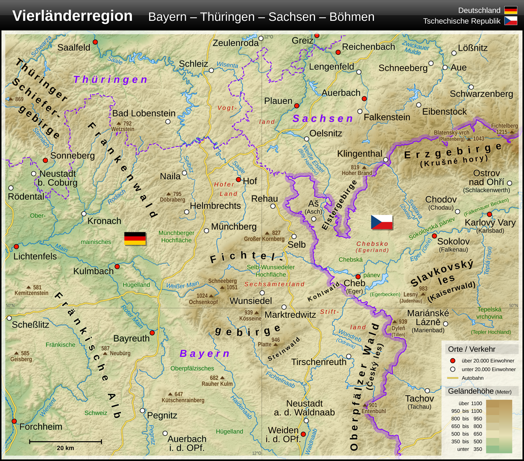 Vierländerregion Bayern, Thüringen, Sachsen, Böhmen (Deutschland/Tschechische Republik)